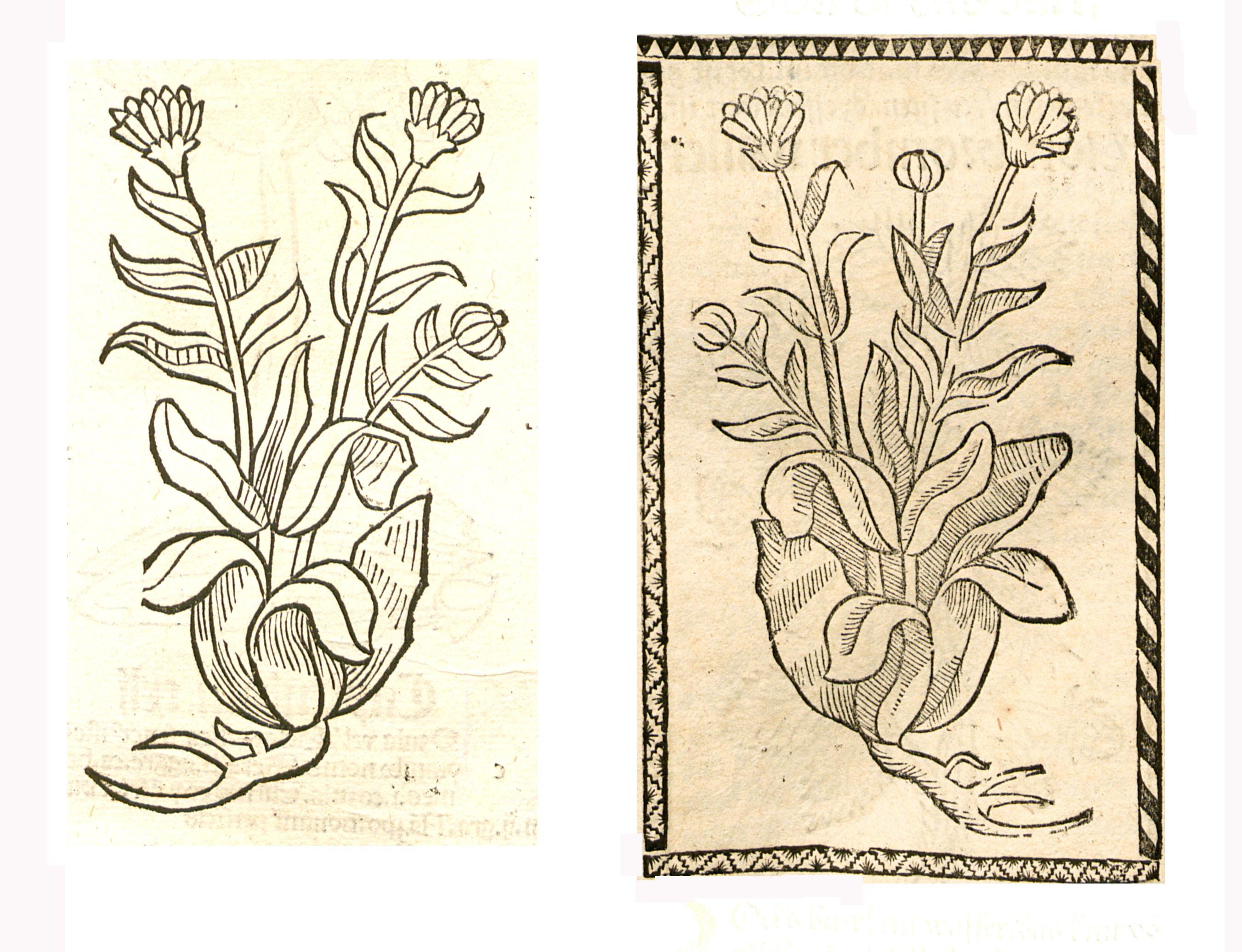 Abbildung von Bocksbart (Tragopogon pratensis)